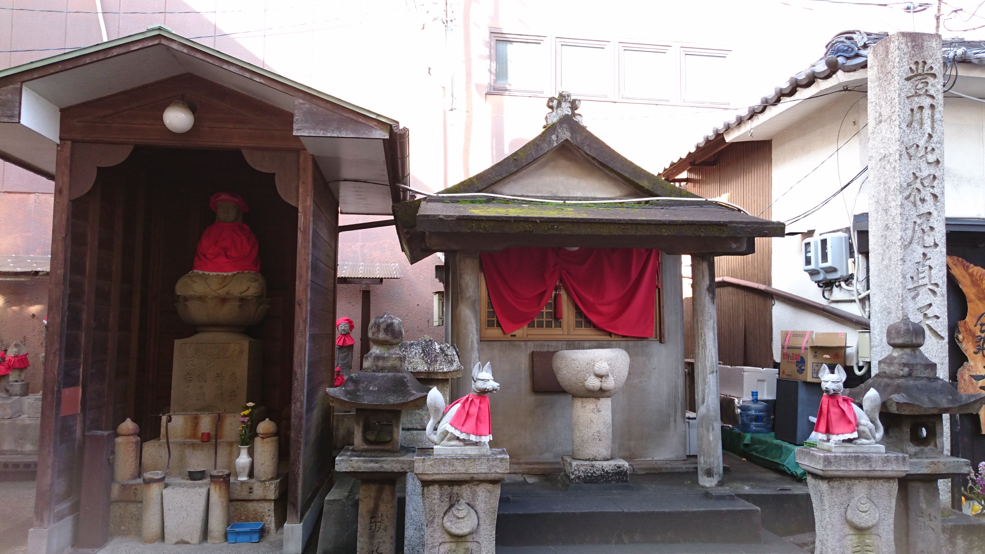 弥八地蔵にある荼枳尼天